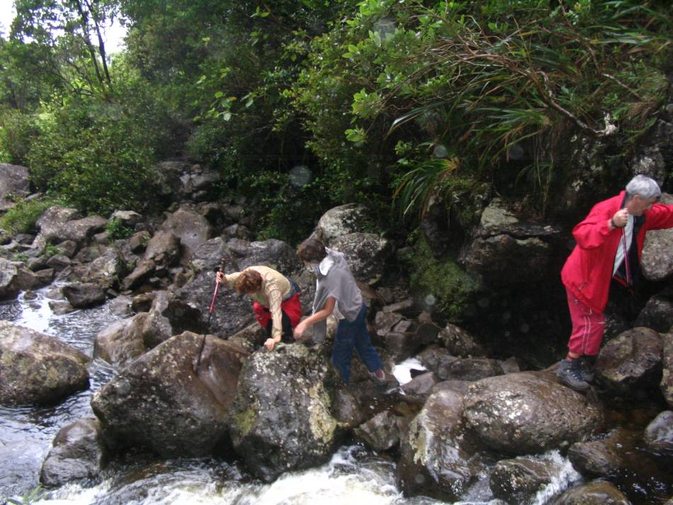 Photo prise par Nerijp en novembre-décembre 2005. Elle est libre de droit d'après cette page.